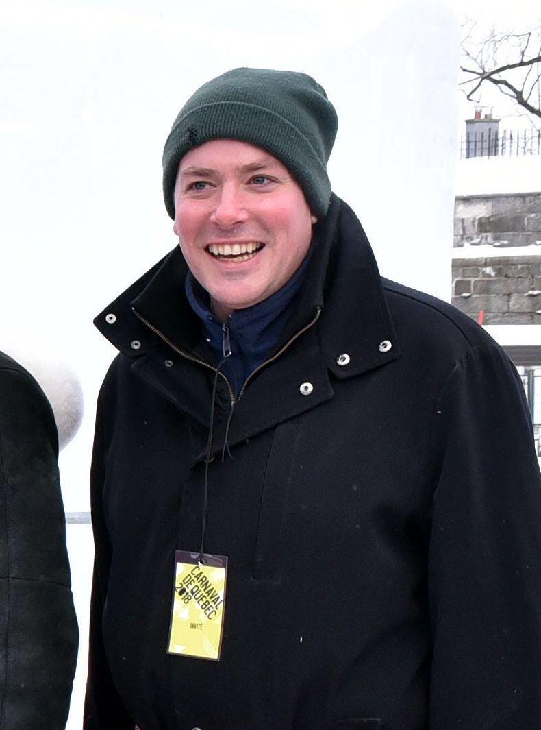 Merci à mes collègues Pierre Paul-Hus, Bernard Généreux, Joël Godin, Sylvie Boucher, Gérard Deltell et Alupa Clarke de nous avoir accueillis, ma famille et moi, alors que nous visitions Québec. Nous sommes tous dans la fourgonnette vers Ottawa. Thank you to my colleagues Pierre Paul-Hus, Bernard Généreux, Joël Godin, Sylvie Boucher, Gérard Deltell and Alupa Clarke for hosting me and my family while we visited Quebec City. We are all packed in the mini van and are Ottawa bound